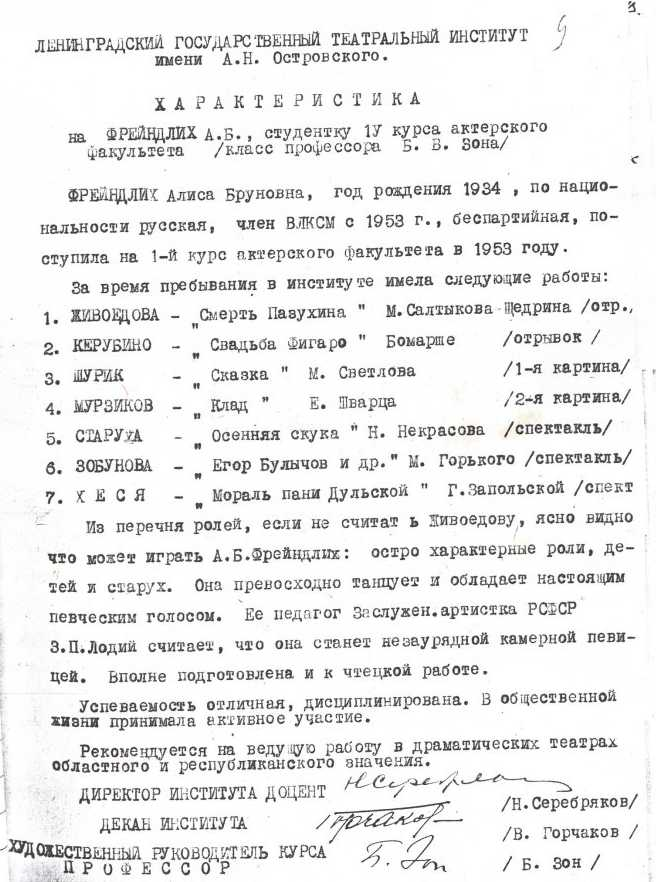 Характеристика, полученная Алисой Фрейндлих после окончания института.